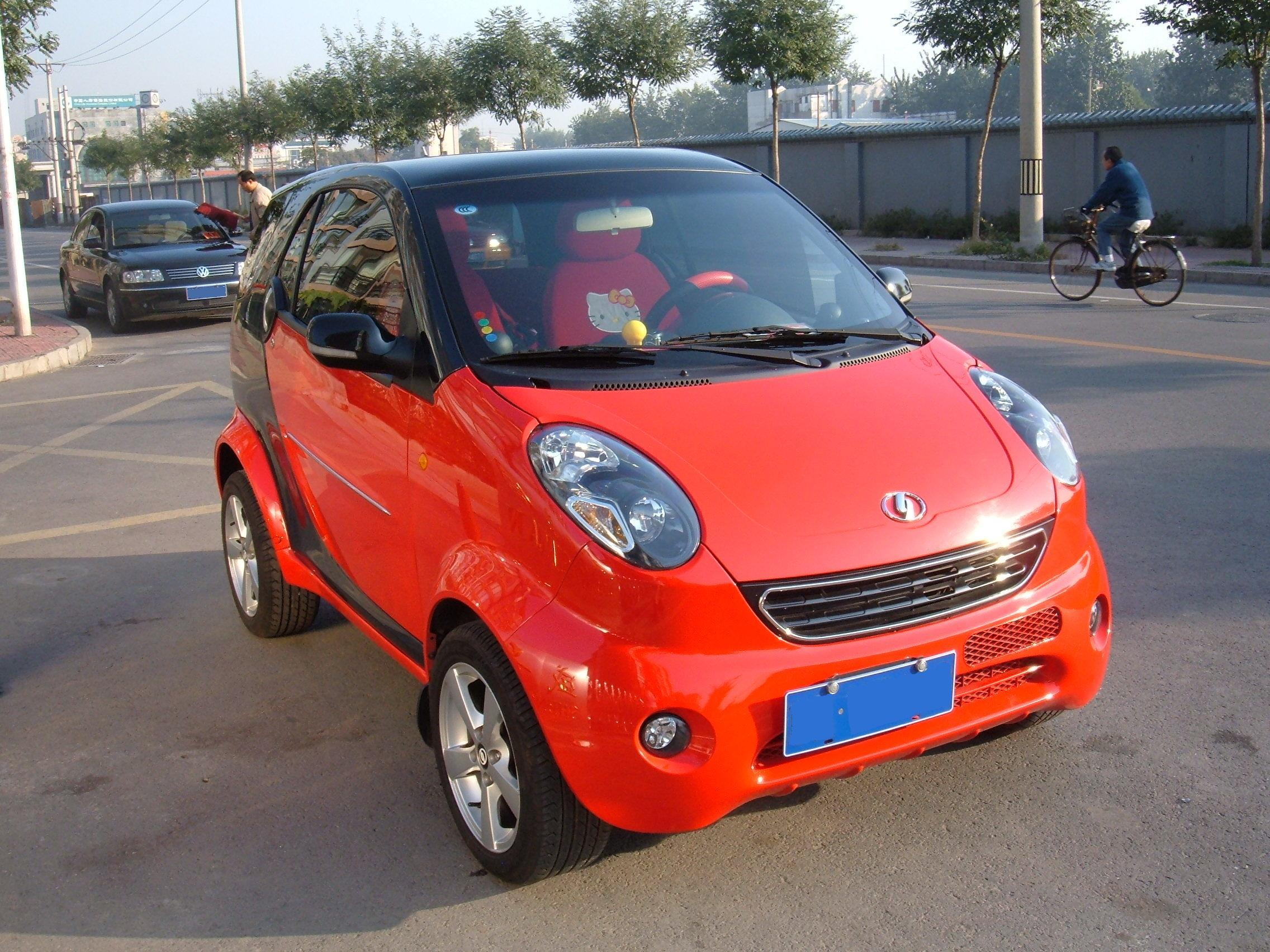 Shuanghuan Noble S6 in Beijing, PRC.